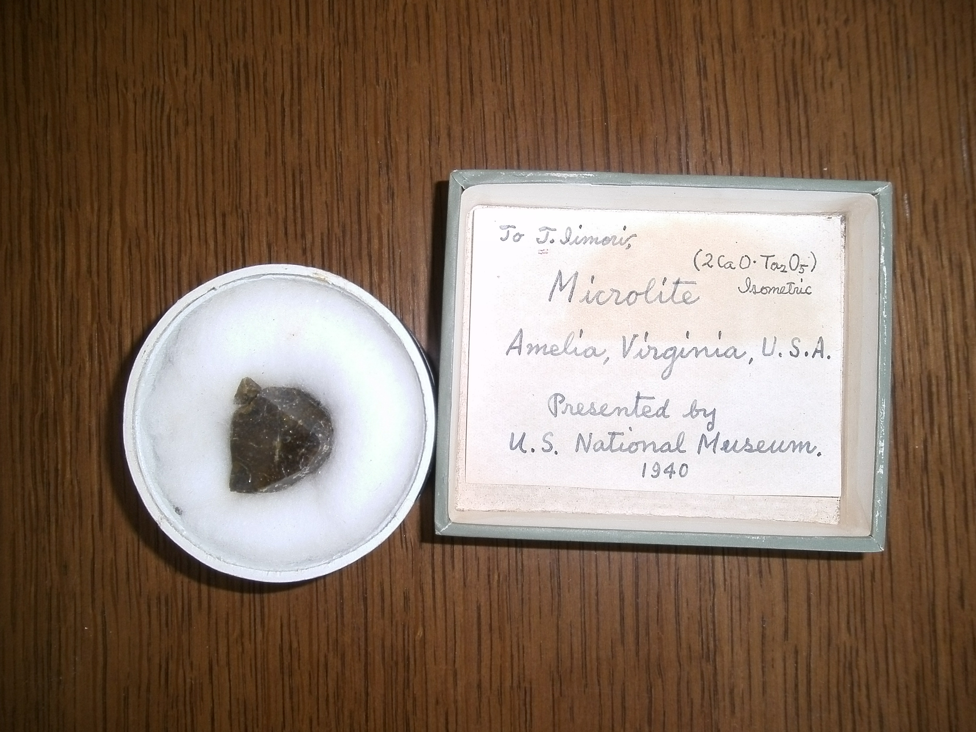 飯盛武夫に贈呈されたMicrolite2